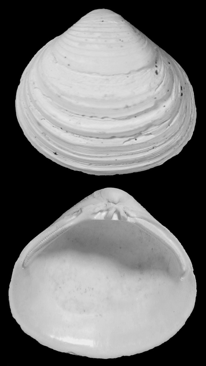 Corbicula fluminalis; fossil; Middle Pleistocene; Maastricht Belvédère